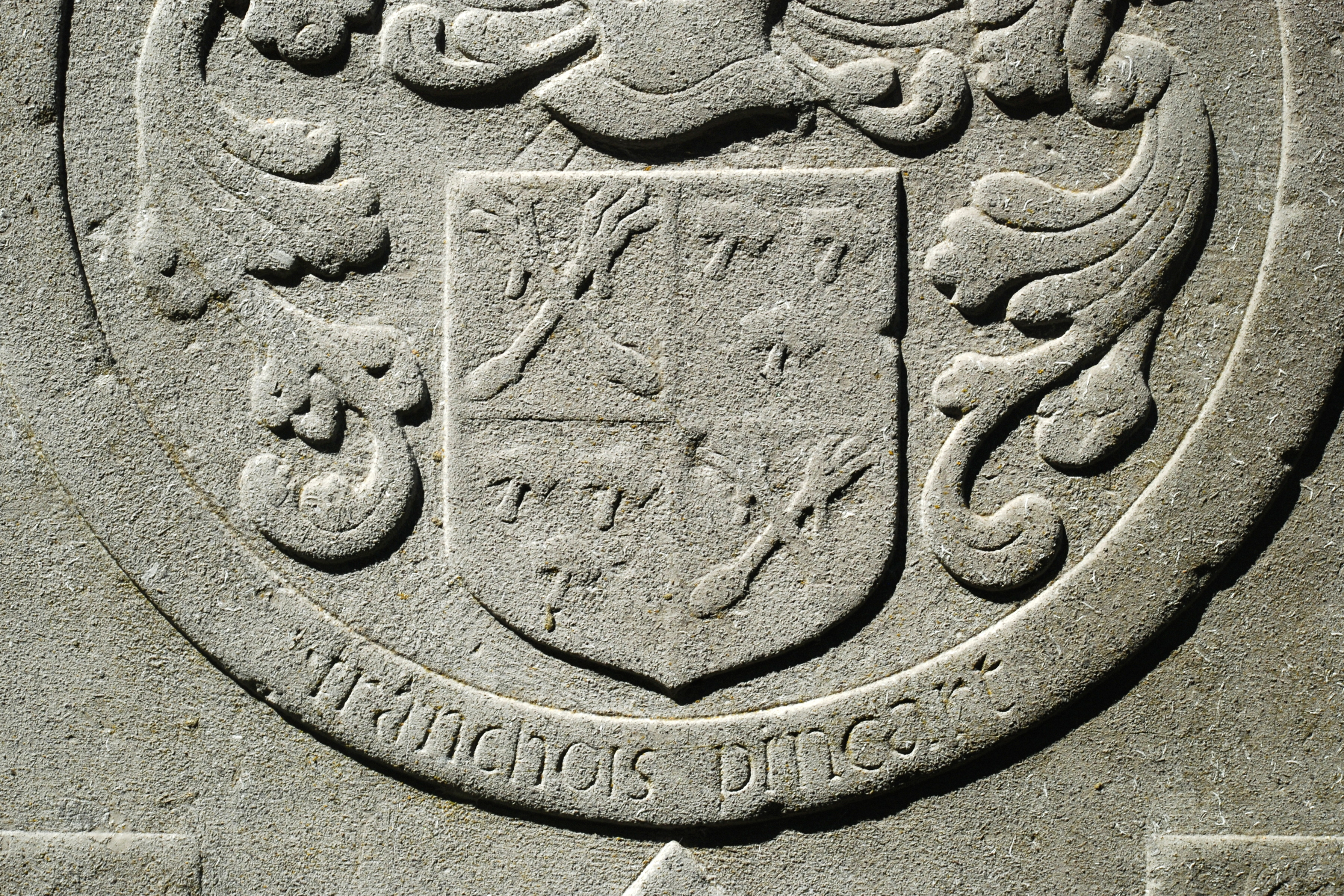 Belgique - Brabant wallon - Mont-Saint-Guibert - Église Saint-Pierre de Corbais - dalle funéraire de Franchois Pincart